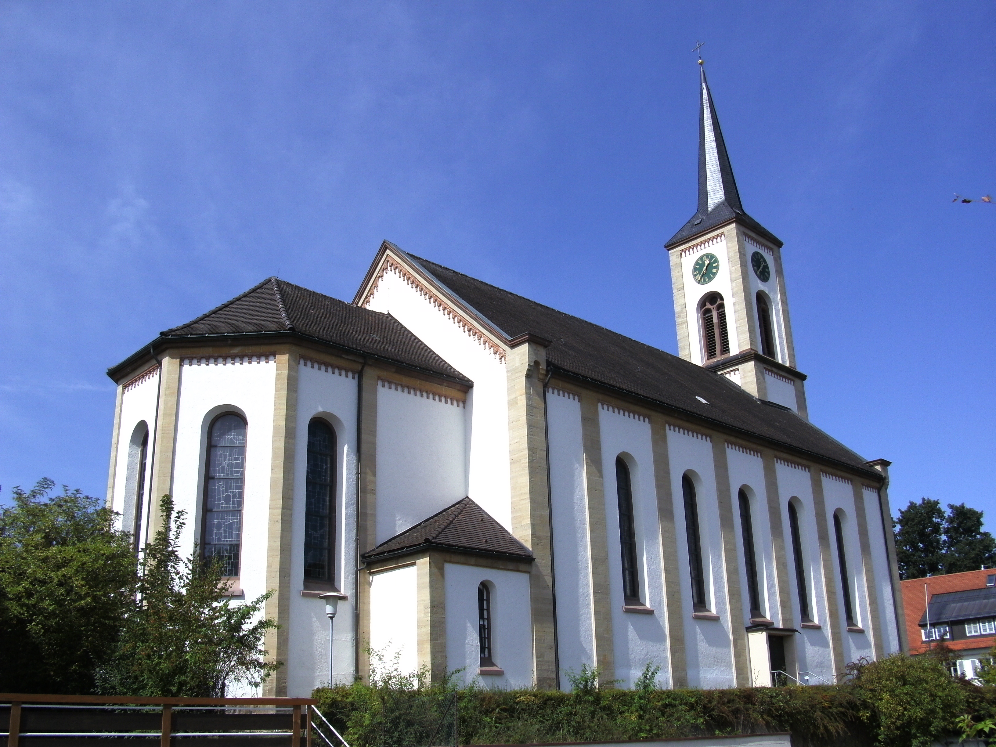 Katholische Kirche St. Cäcilia, Dauchingen, Deutschland